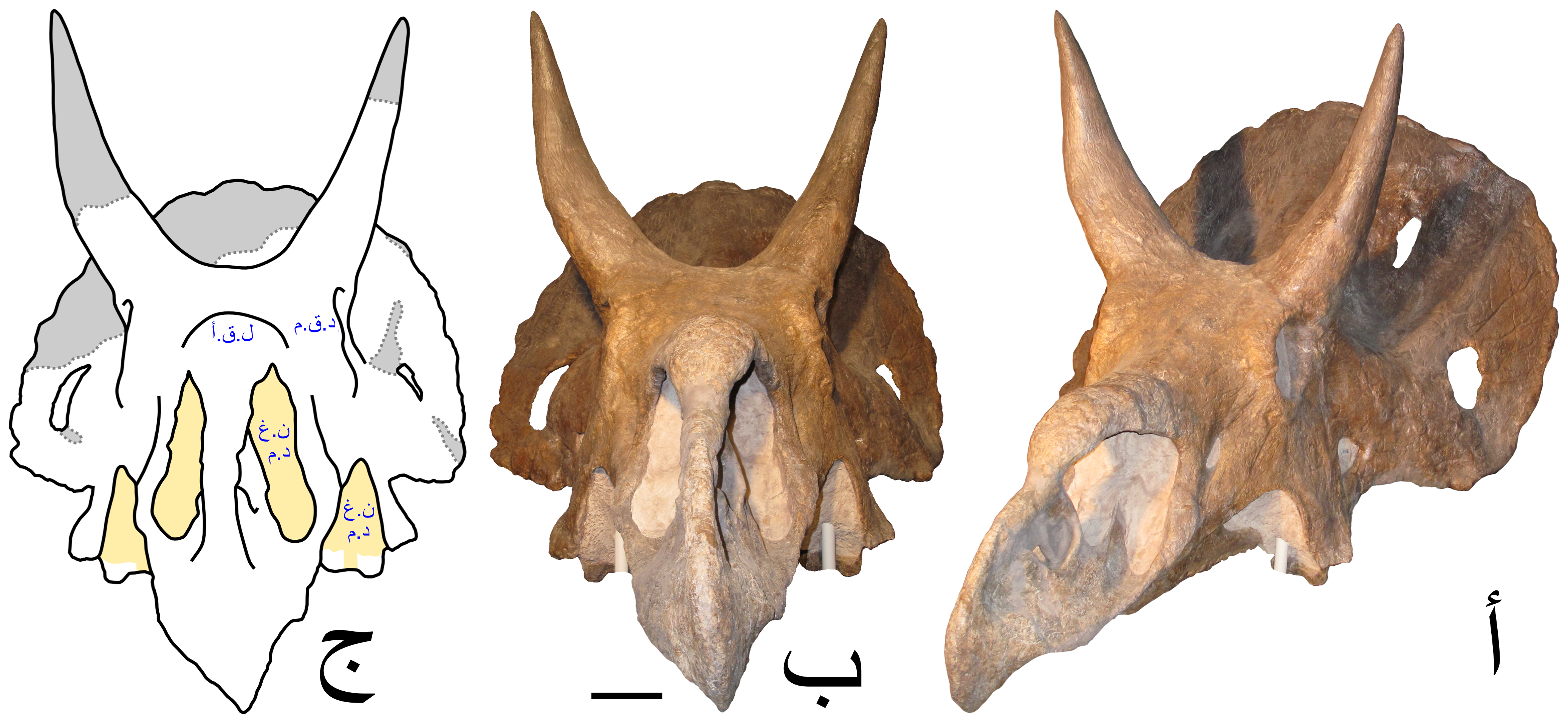 جُمجُمة النيدوسيراتوپس الهاتشري، العيِّنة رقم USNM 2412. أ صورة يساريَّة مائلة. ب صورة أماميَّة. ج رسمٌ تفسيريّ للمنظر الأماميّ يُظهرُ أبرز المواضع التي أعاد العُلماء تركيبها بالرمادي، بينما يظهر موضع النسيج الغشائي بالأصفر. الاختصارات: د.ق.م: الدعامة قبمحجريَّة؛ ن.غ د.م: النسيج الغشائي والدعامة المعدنيَّة؛ ل.ق.أ: لُب القرن الأنفي.